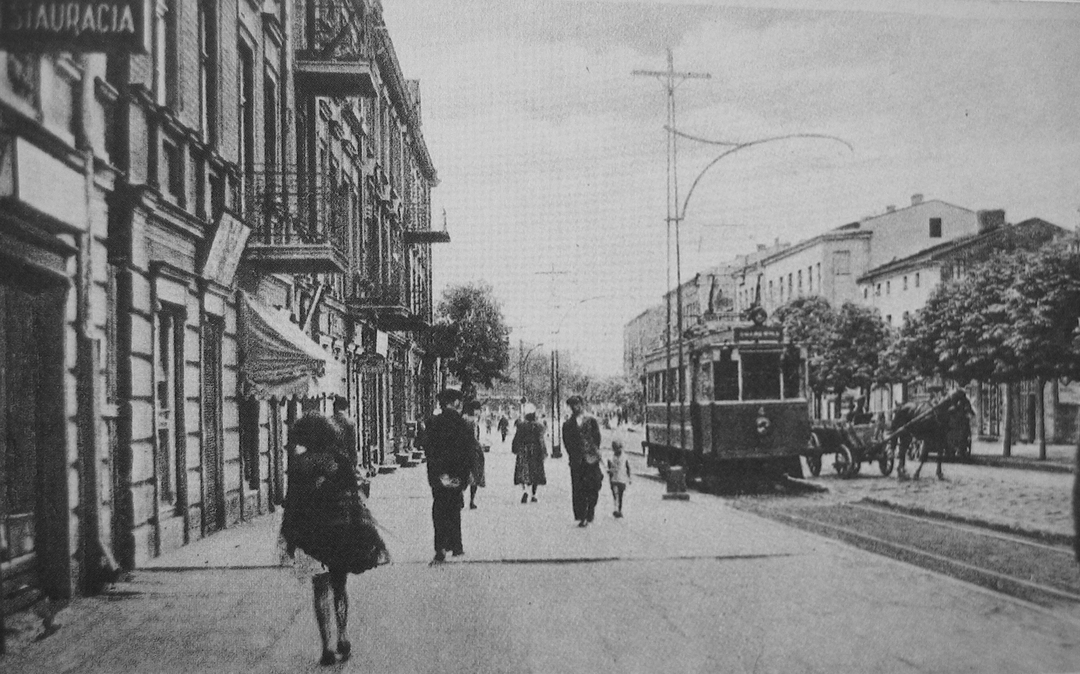 Dąbrowa. Ulica Sobieskiego